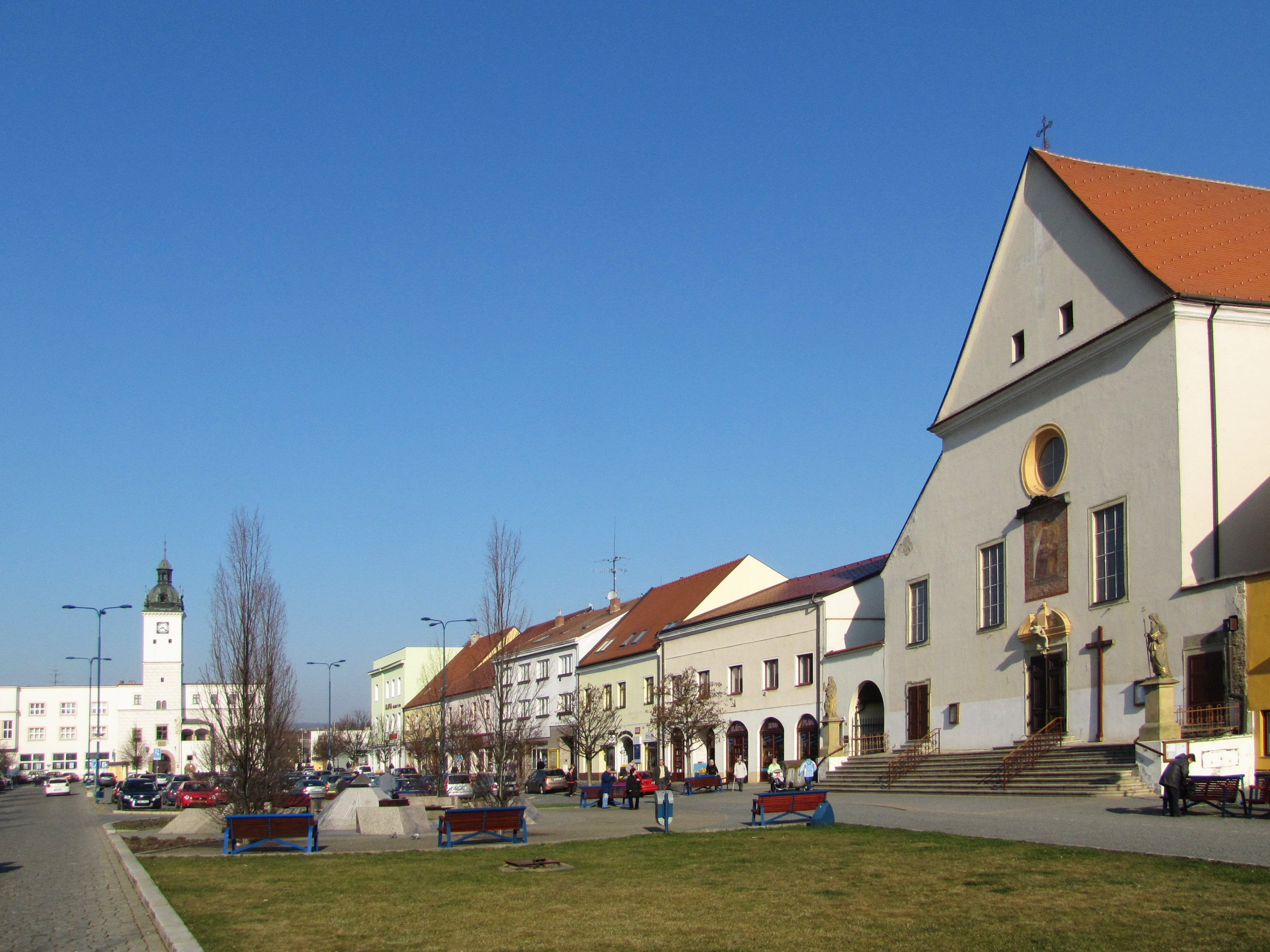 Masarykovo náměstí v Kyjově